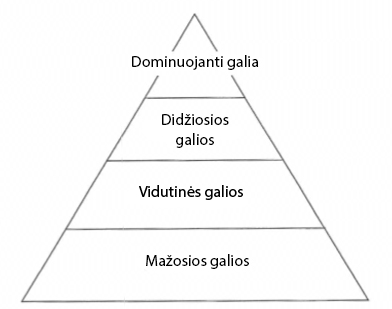 Valstybių hierarchijos schema